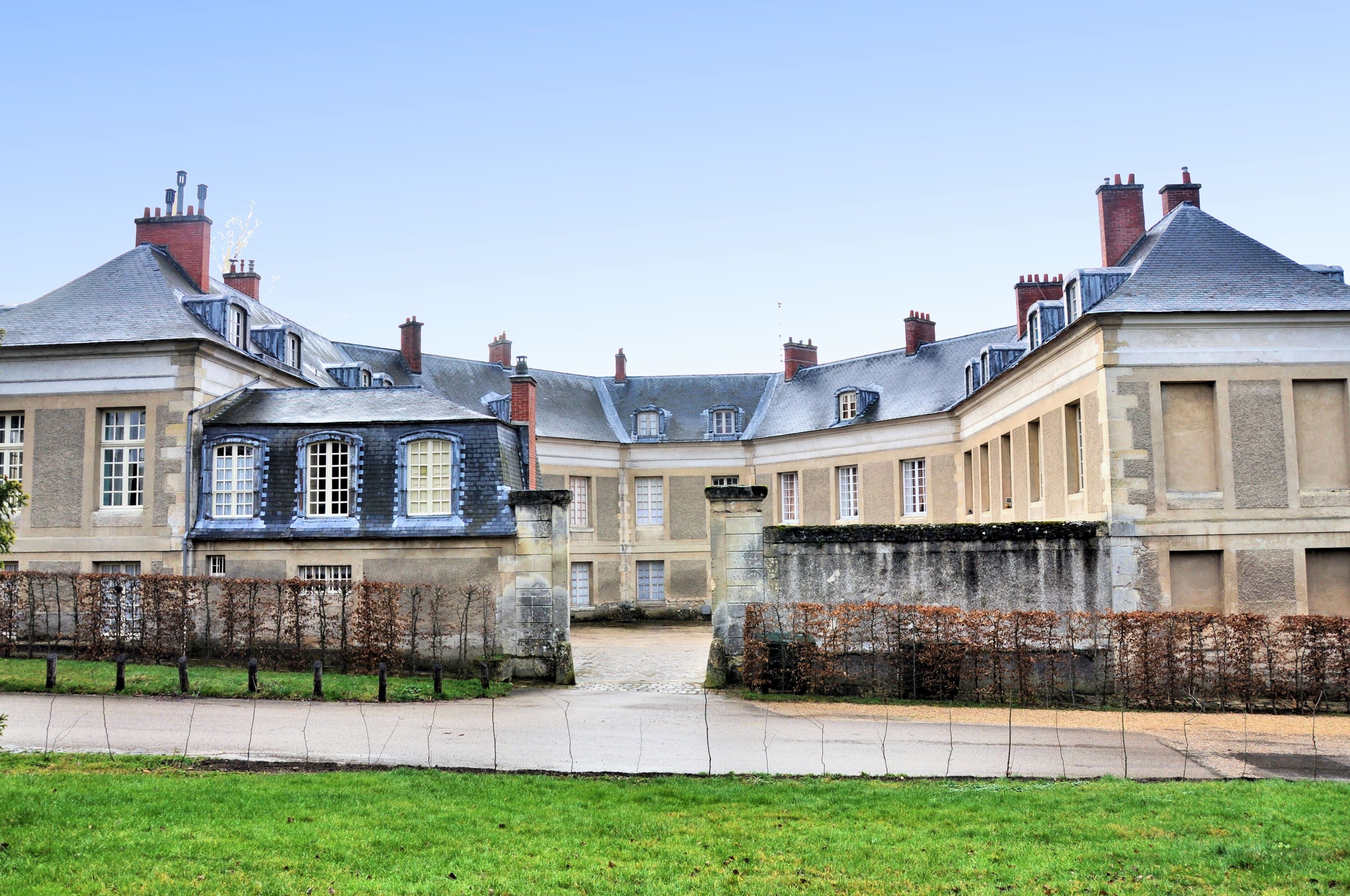 Petit Trianon - Pavillon de Châteauneuf